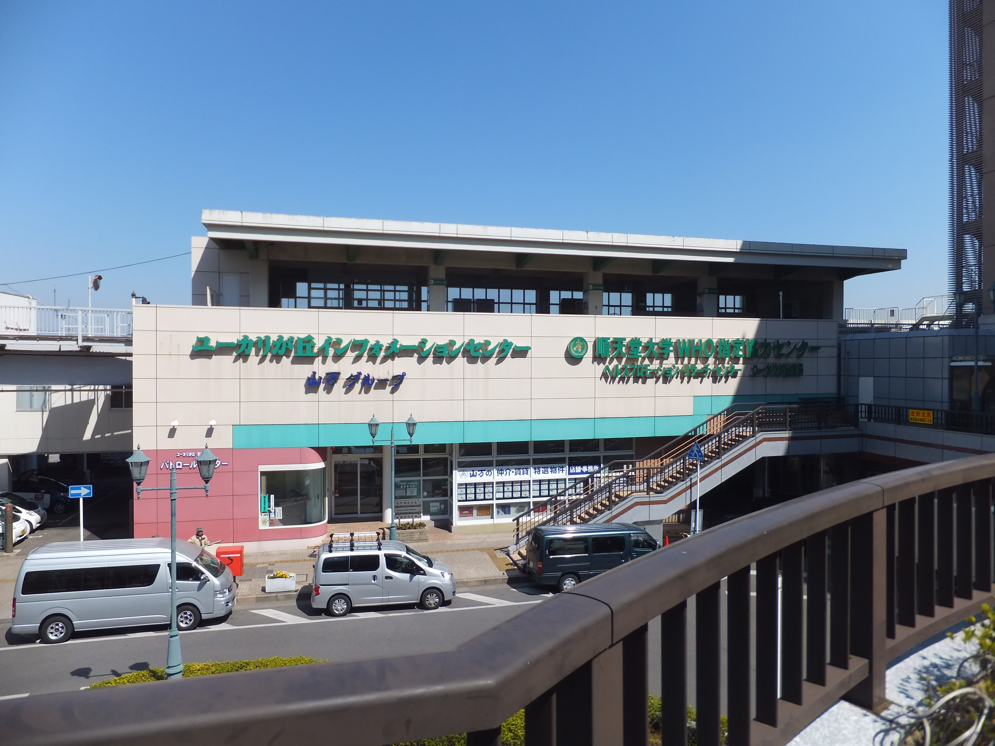 山万ユーカリが丘線ユーカリが丘駅駅舎